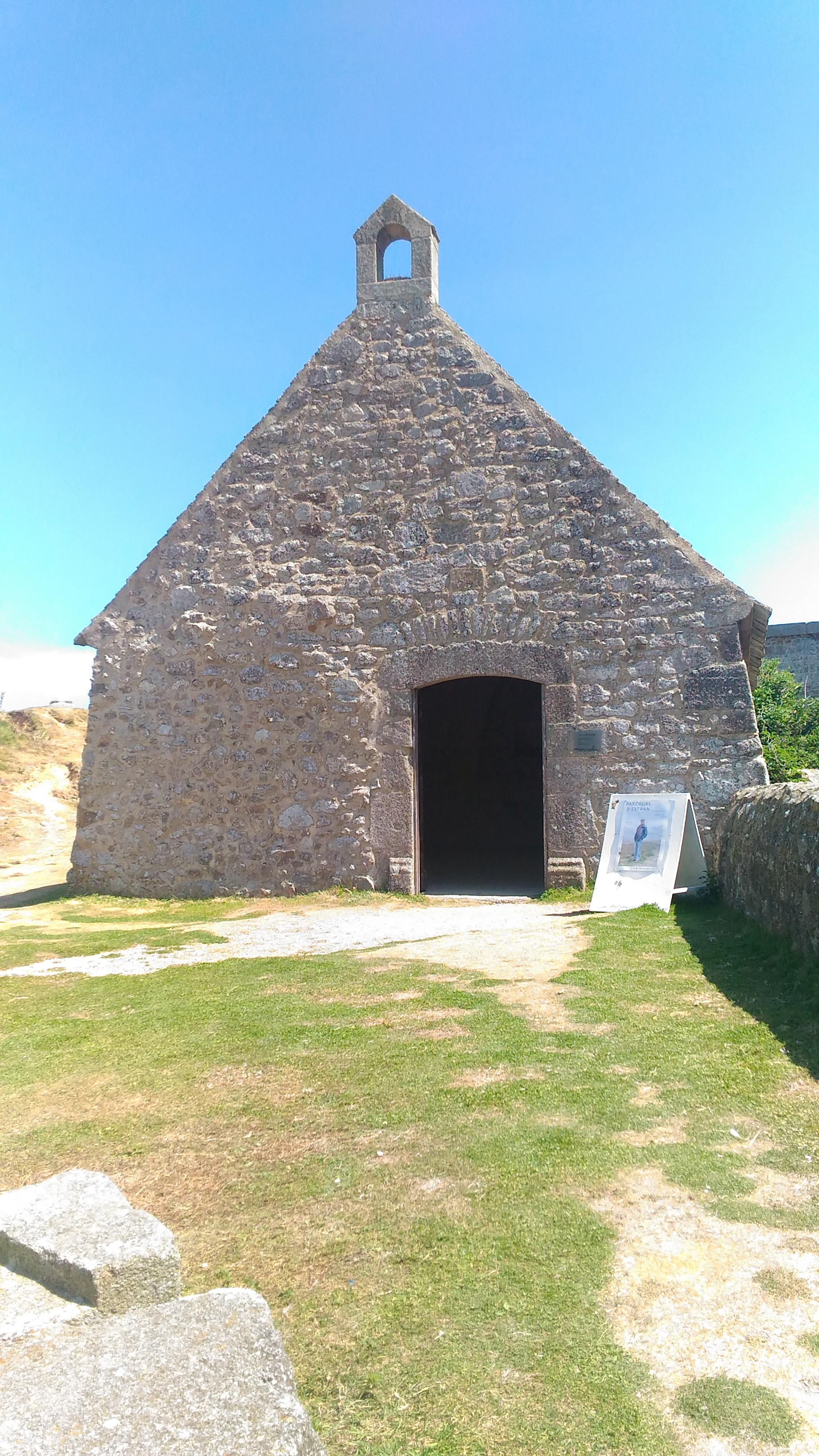 Chapelle